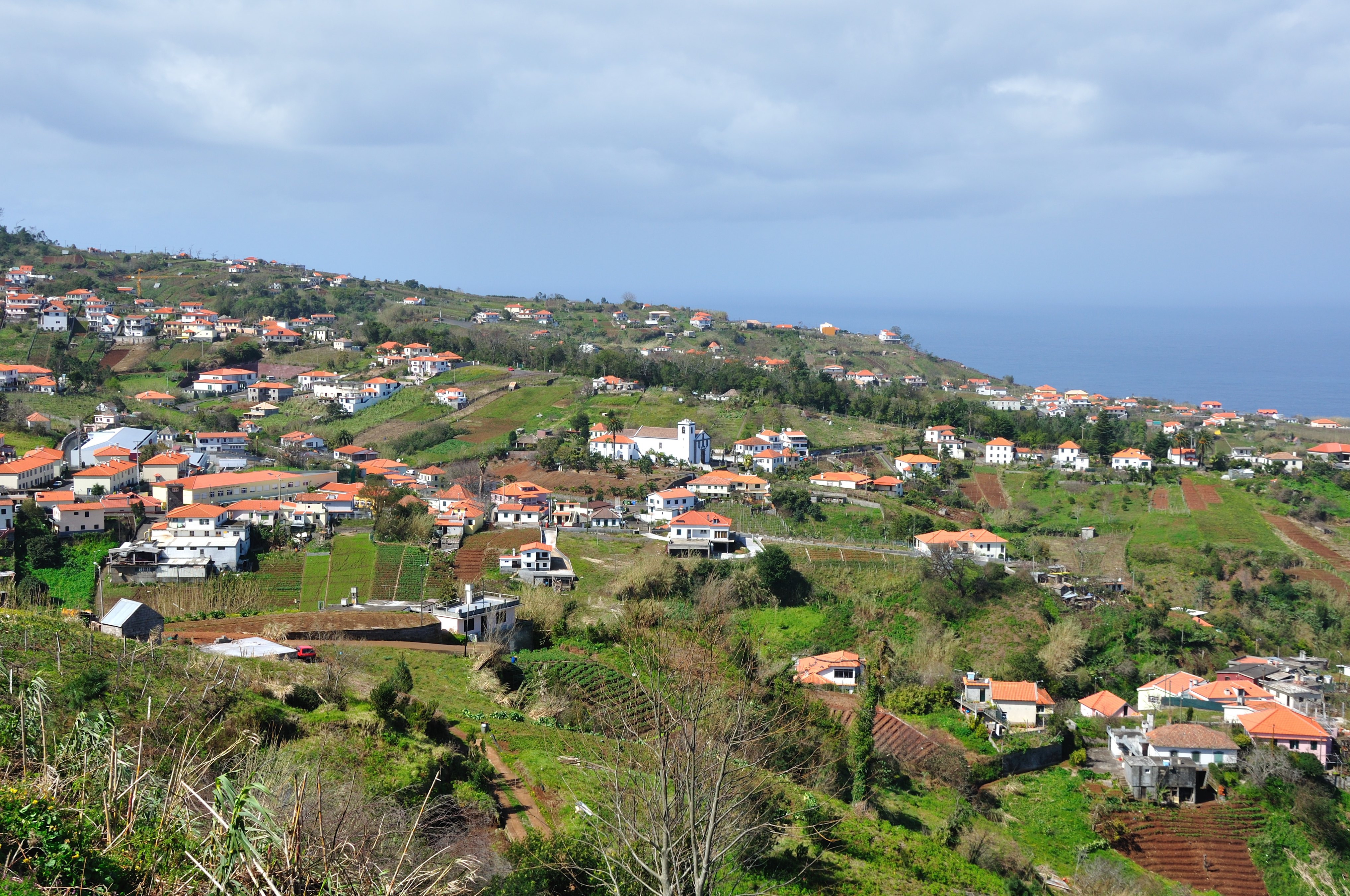 Portugal, Madeira, views in São Jorge